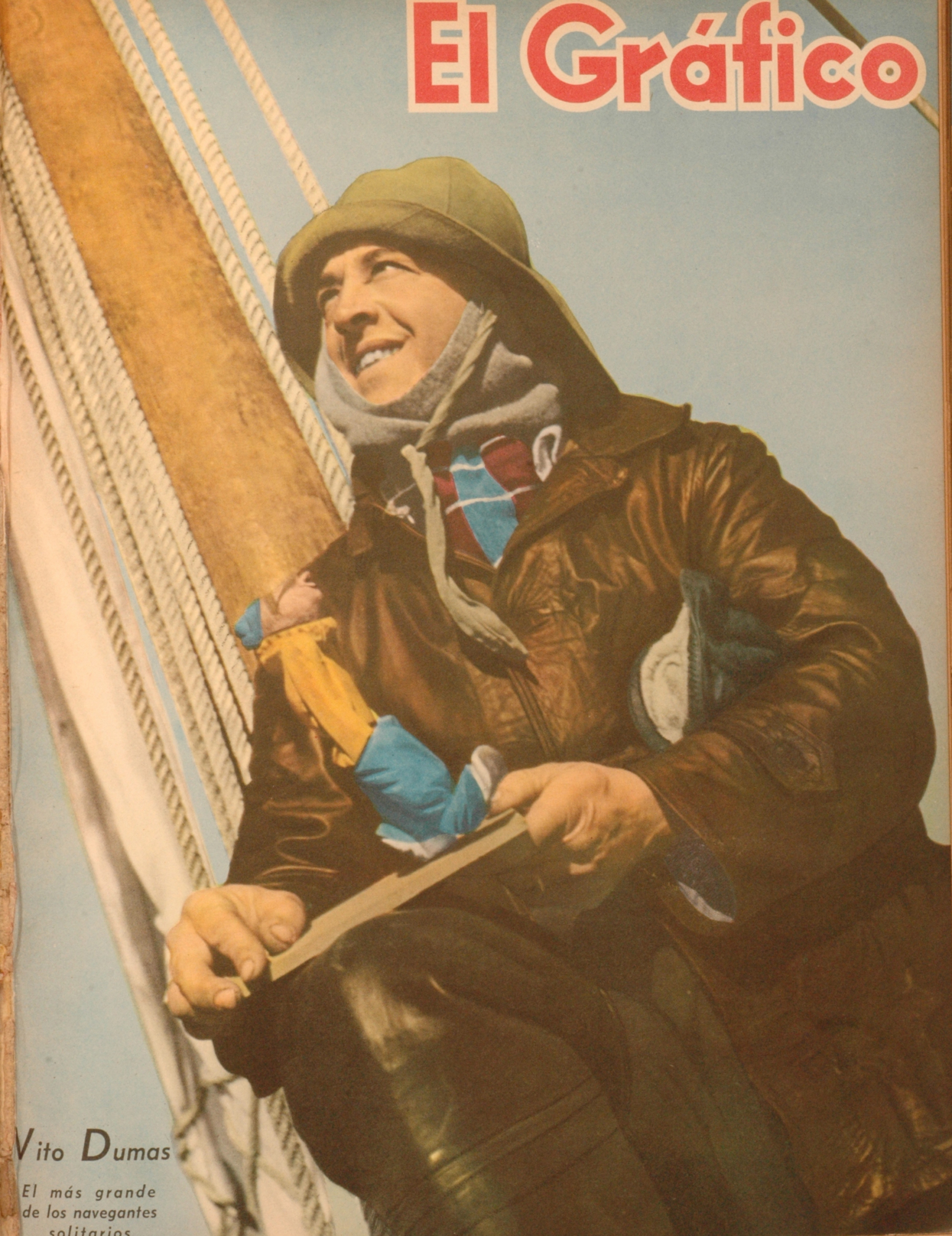 El Grafico del 23 de Julio de 1943. Edicion 1254